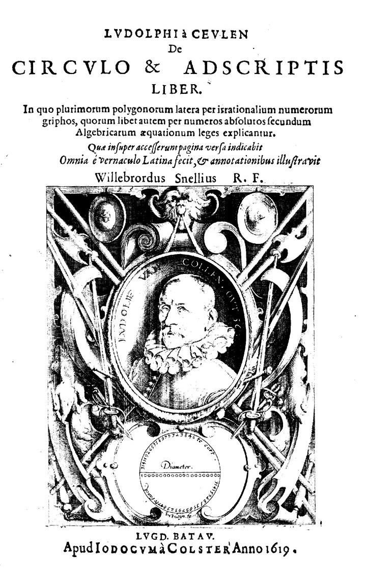 Ludolphi a Ceulen De circulo et adscriptis liber. In quo plurimorum polygonorum latera per irrationalium numerorum griphos, ... explicantur. ... Omnia è vernaculo latina fecit, & annotationibus illustravit Willebrordus Snellius …. - Lugd. Batav. : apud Iodocum a Colster, 1619 (Lugd. Batau. : excudebat Georgius Abrahami á Marsce, 1619). - [8], 220, 54 p. : 1 ritratto ; 4º .